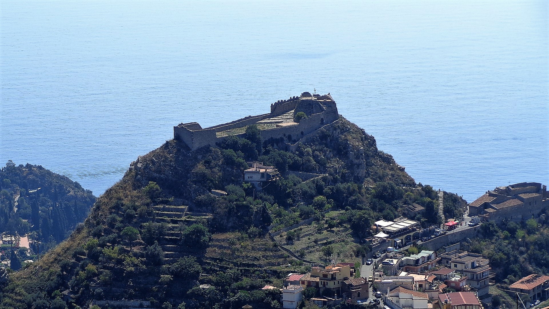 Panorama e dettaglio sul castello di Taormina.